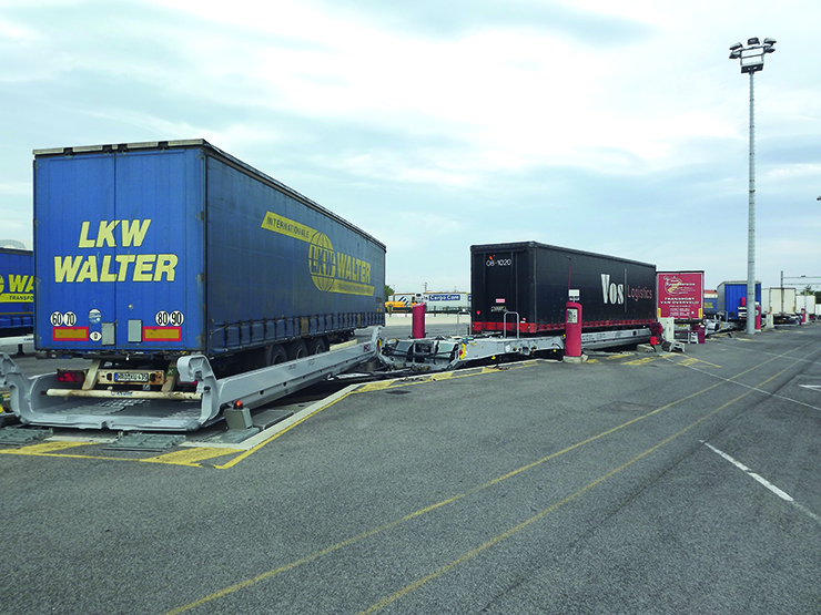 Les wagons LOHR pour le transport des remorques par les rails.